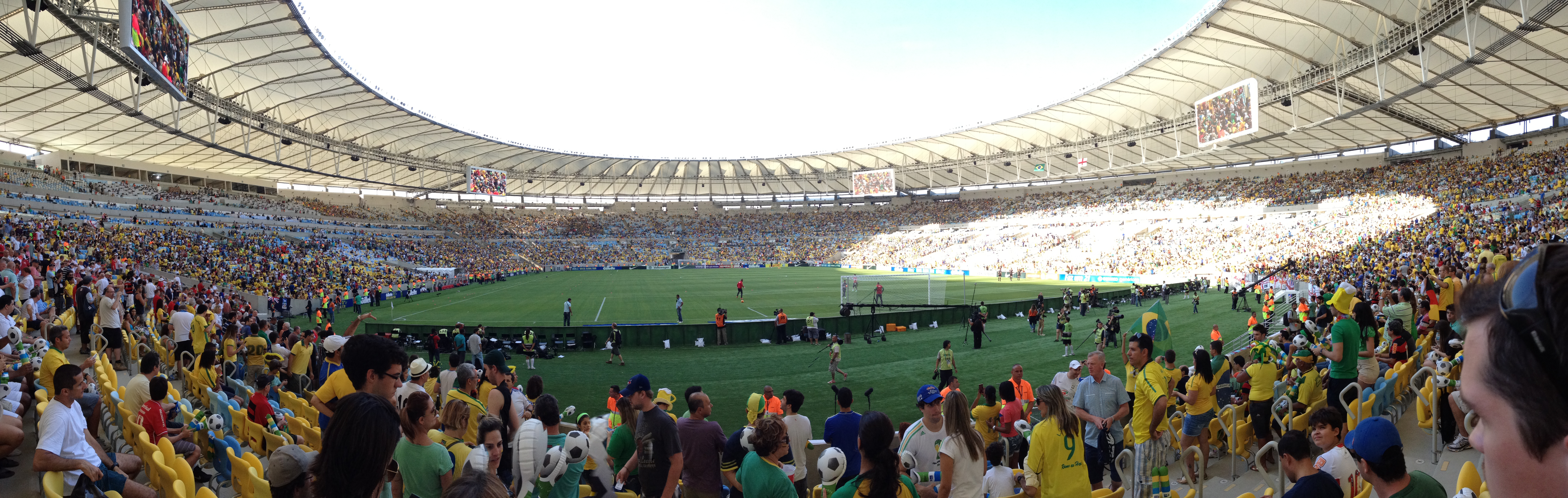 Maracanã June 2 2013